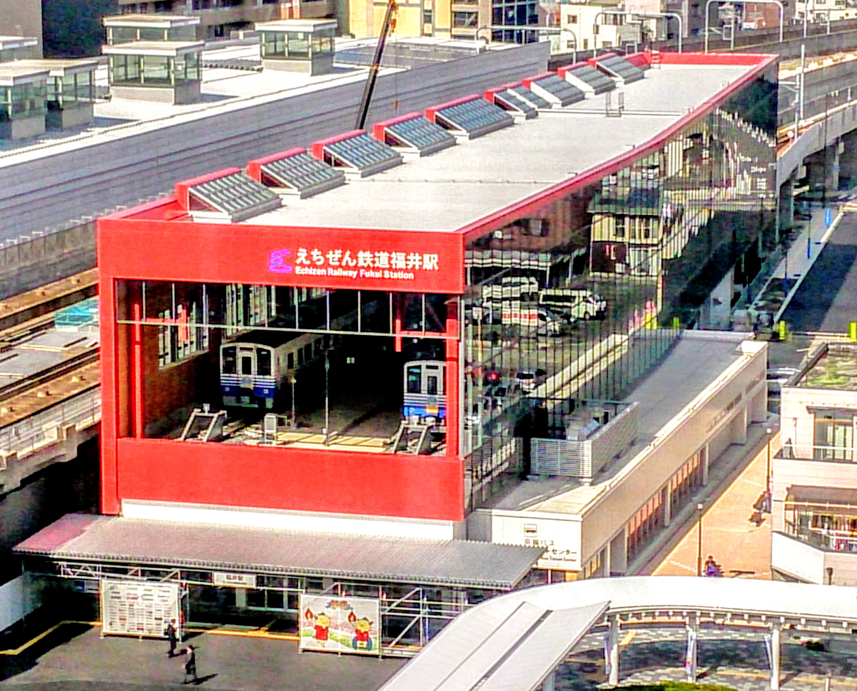 えちぜん鉄道 福井駅